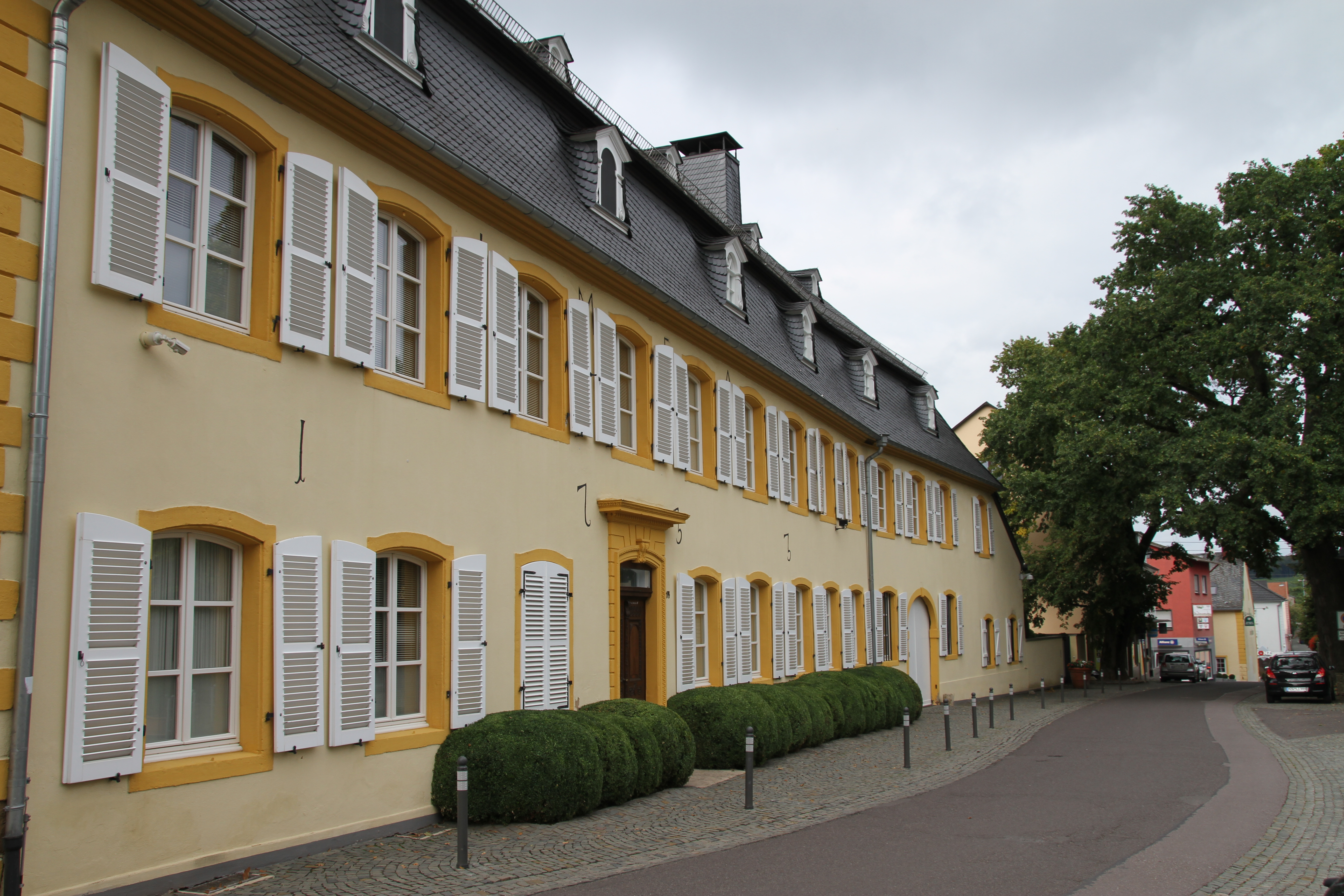 Palais von Nell in Perl an der Mosel